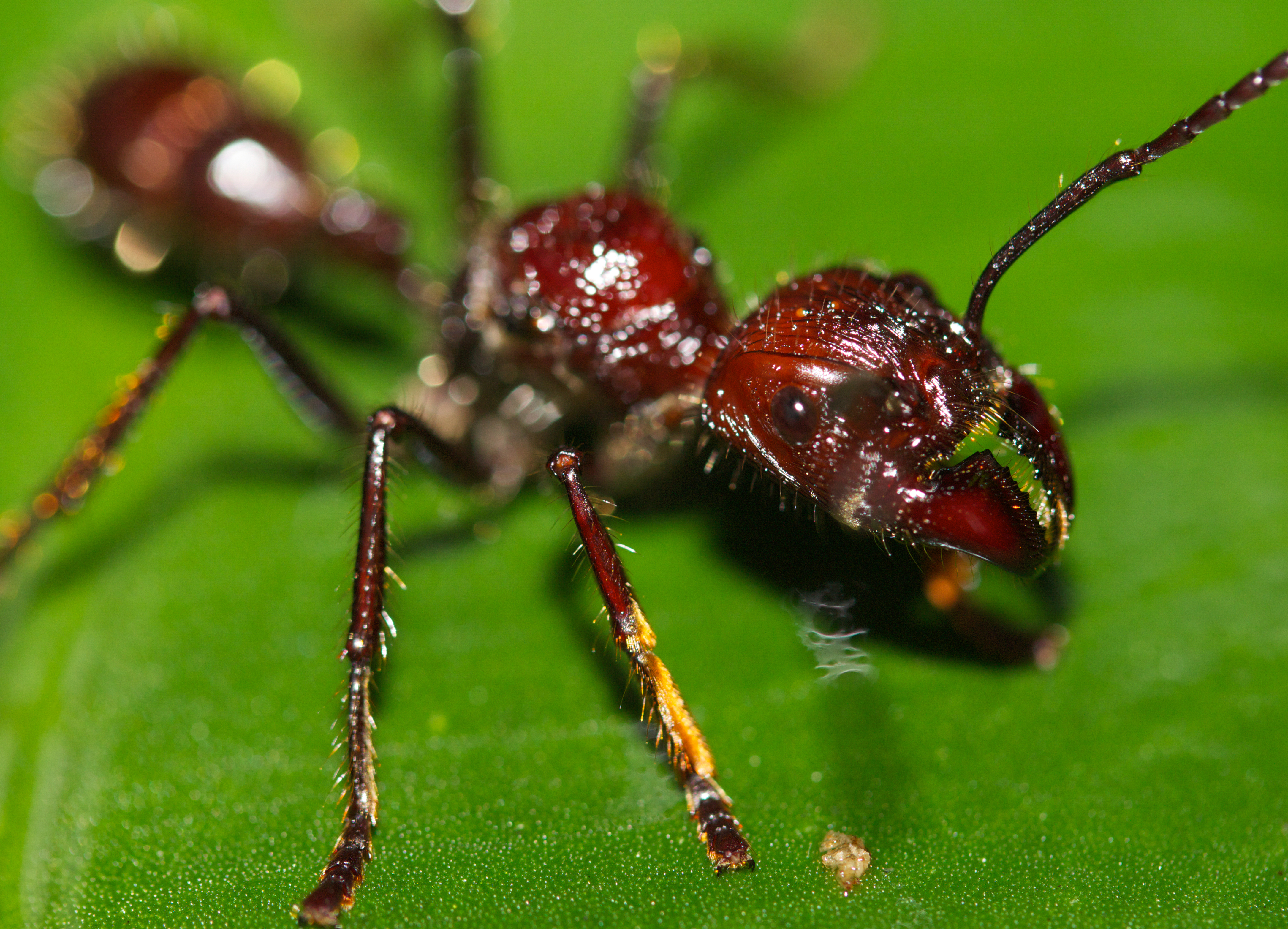 bullet ant